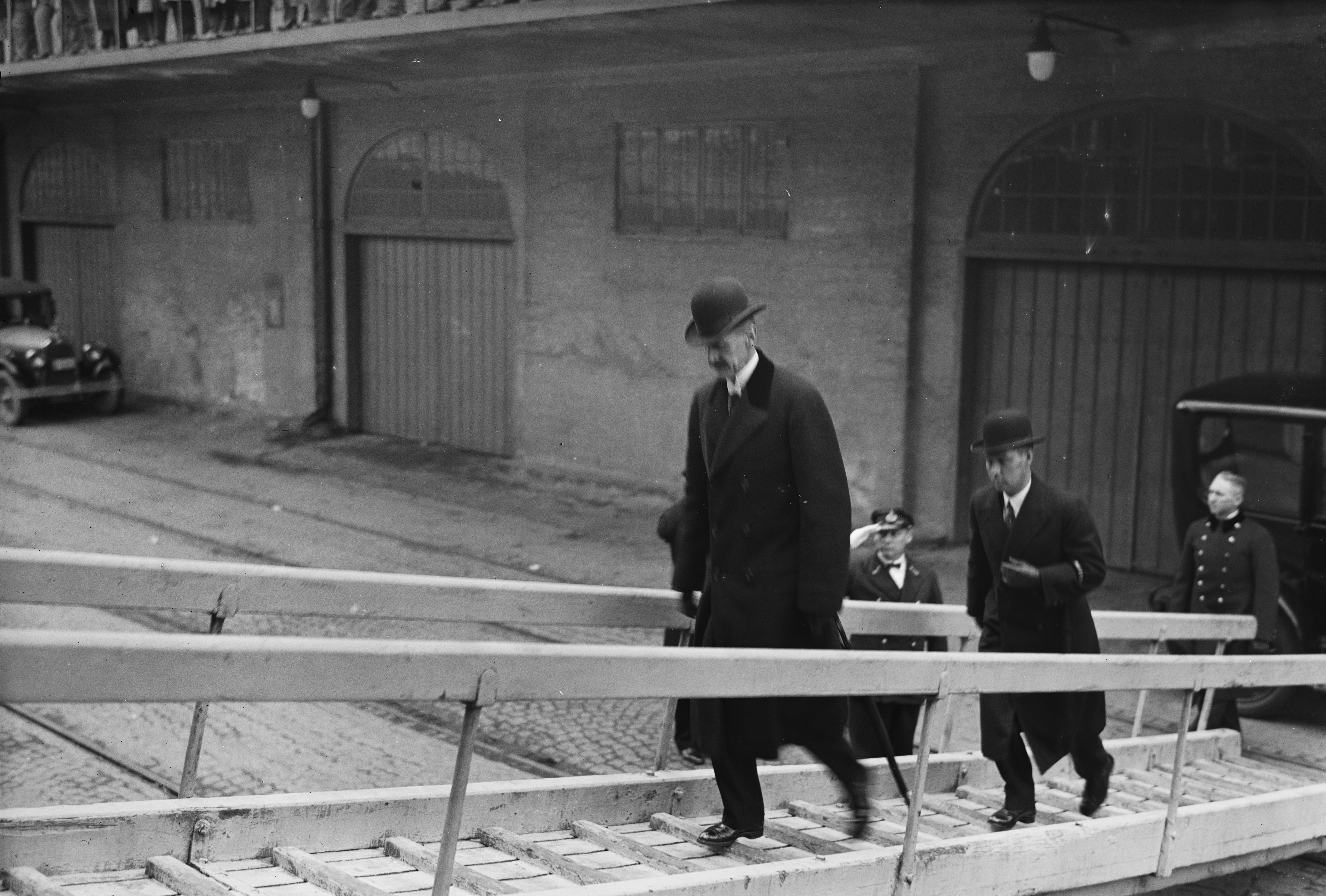 Bildet er hentet fra Nasjonalbibliotekets bildesamling. Anmerkninger til bildet var: Kongen beier "Venus"